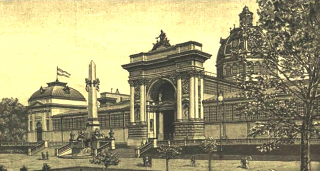 Budapest. Iparcsarnok (1896-1946)